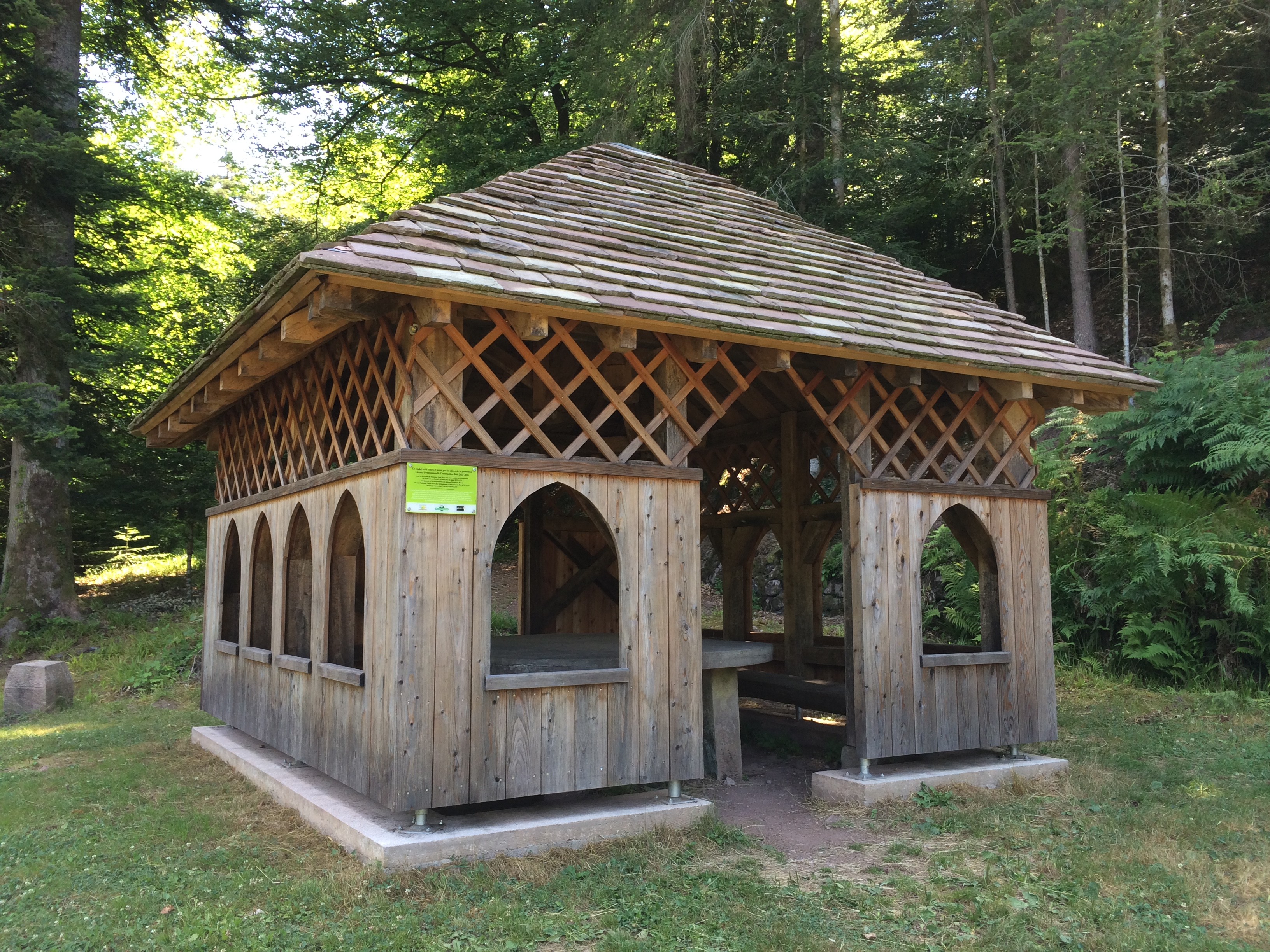 Rénové en 2016, le Chalet de l'empereur au lieu-dit du Breuil à l’intersection de la Route forestière du Villerain et de la Route forestière des Tanchottes.